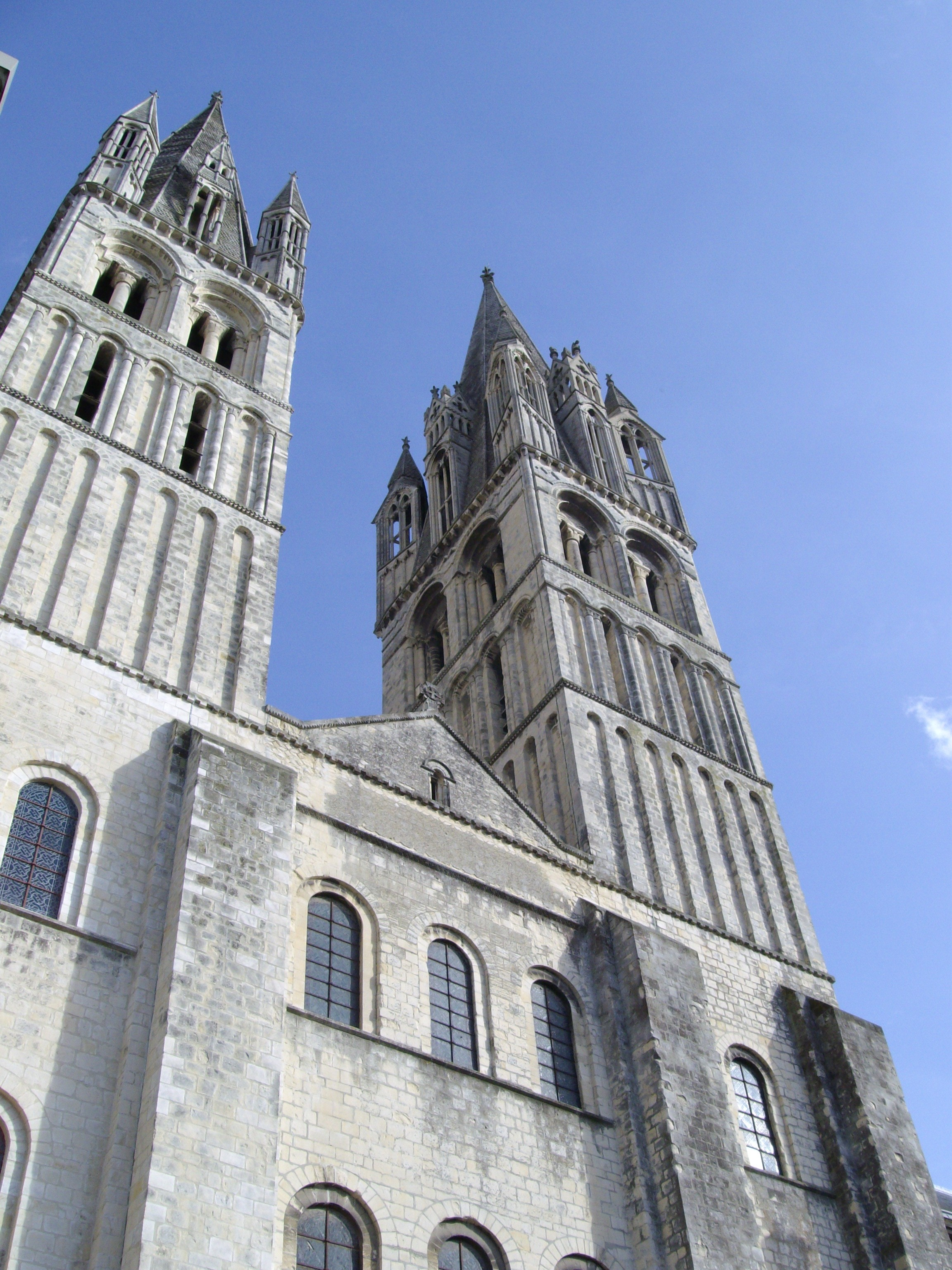 façade occidentale de l'église Saint-Étienne de l'abbaye aux Hommes à Caen (Calvados, Basse-Normandie).